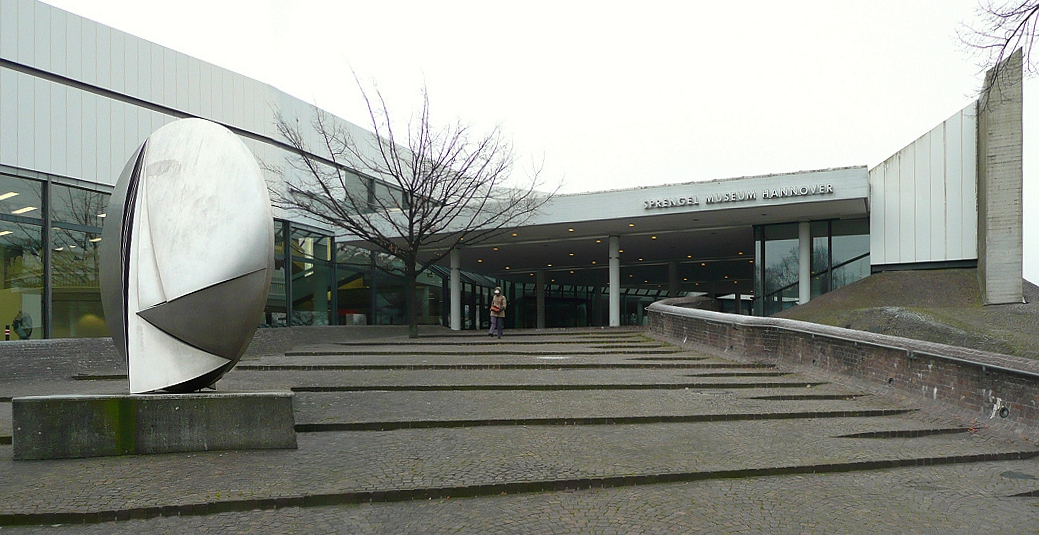 Sprengel Museum Hannover